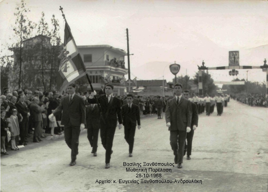 Ο Βασίλης Ξανθόπουλος σημαιοφόρος στην παρέλαση της 28-10-1968 στη Δράμα.